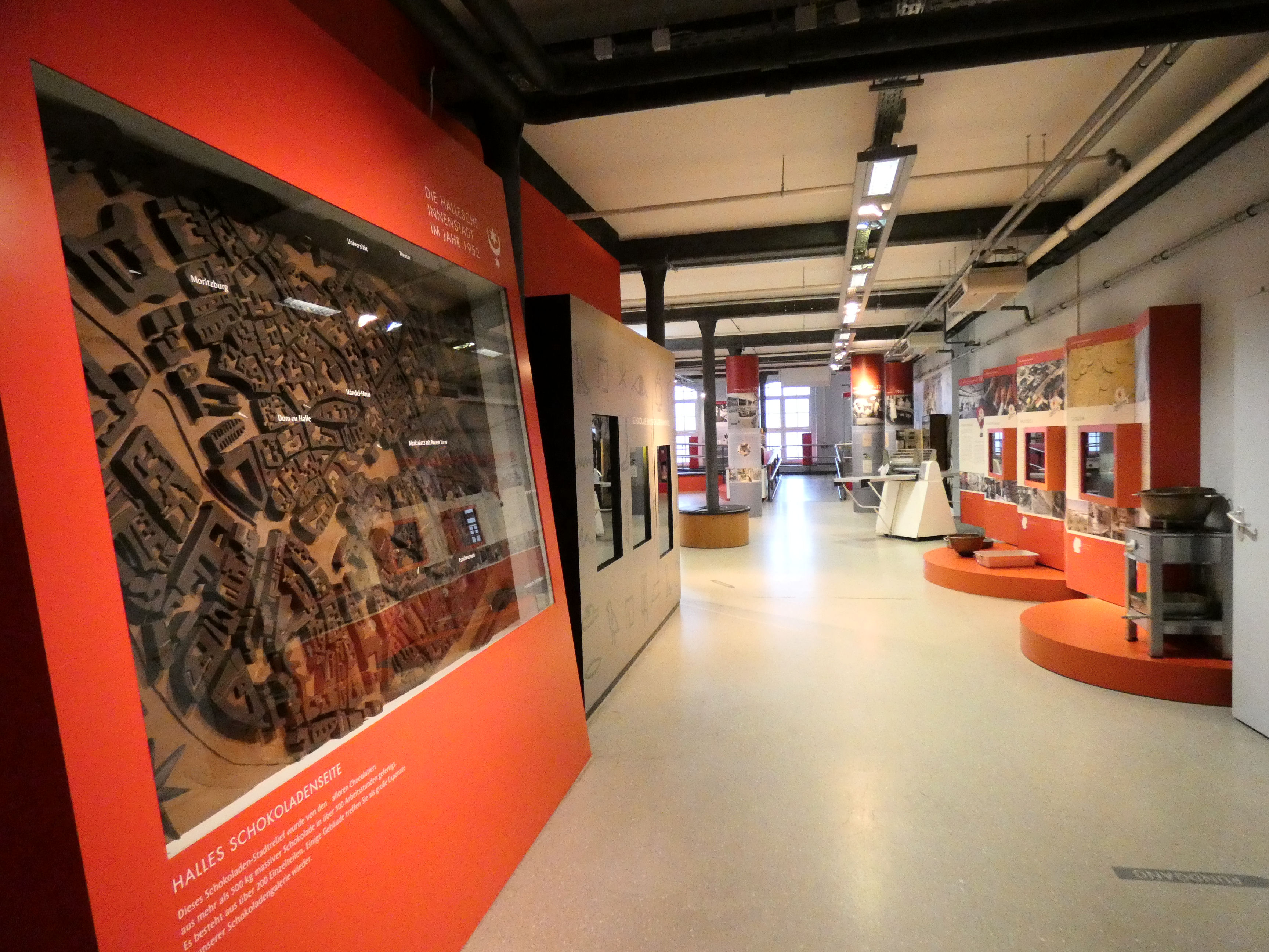 Schokoladenmuseum der Halloren Schokoladenfabrik, Halle (Saale), links: Schokoladenrelief der Altstadt von Halle